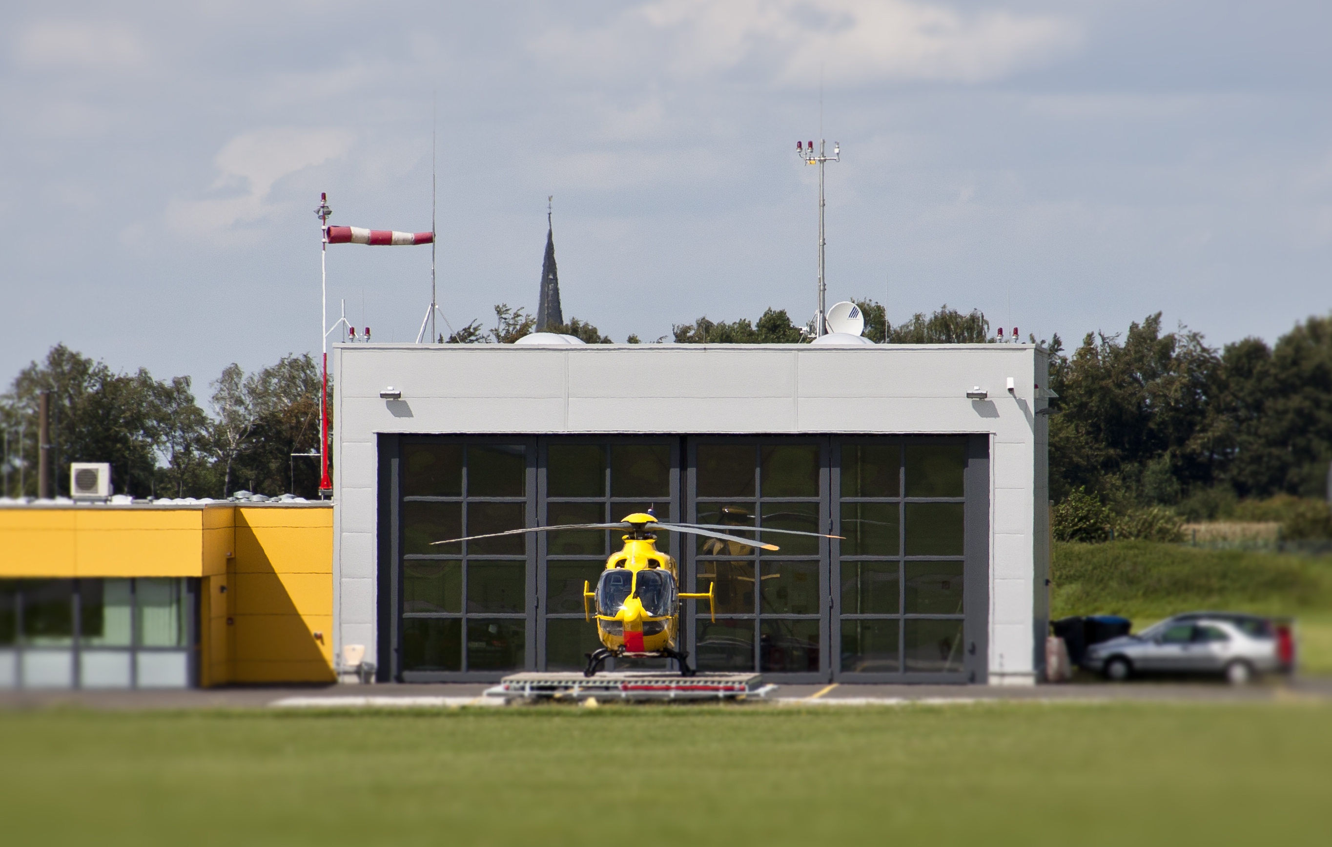 Hangar des vom ADAC betriebenen Rettungshubschrauber Christoph Europa 1 auf dem Flugplatz Merzbrück bei Aachen.